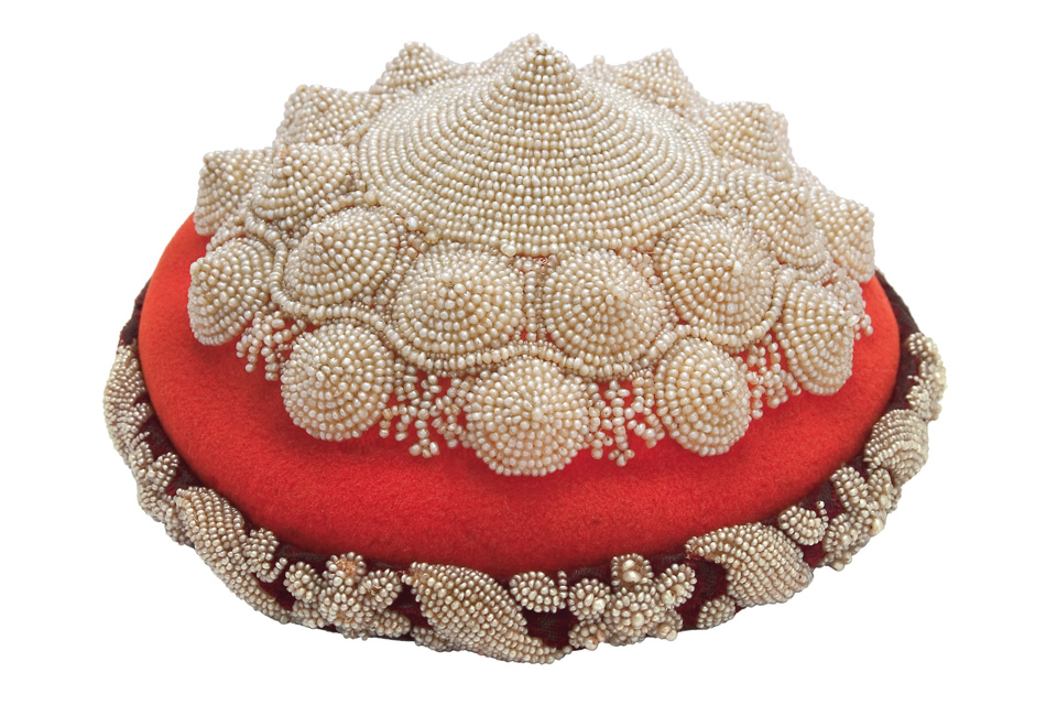 Srpski (latinica): Tepeluk i bareš; druga polovina XIX veka; čoja, biseri, vez; Muzej primenjene umetnosti u Beogradu, inv. br. 950 i 1888